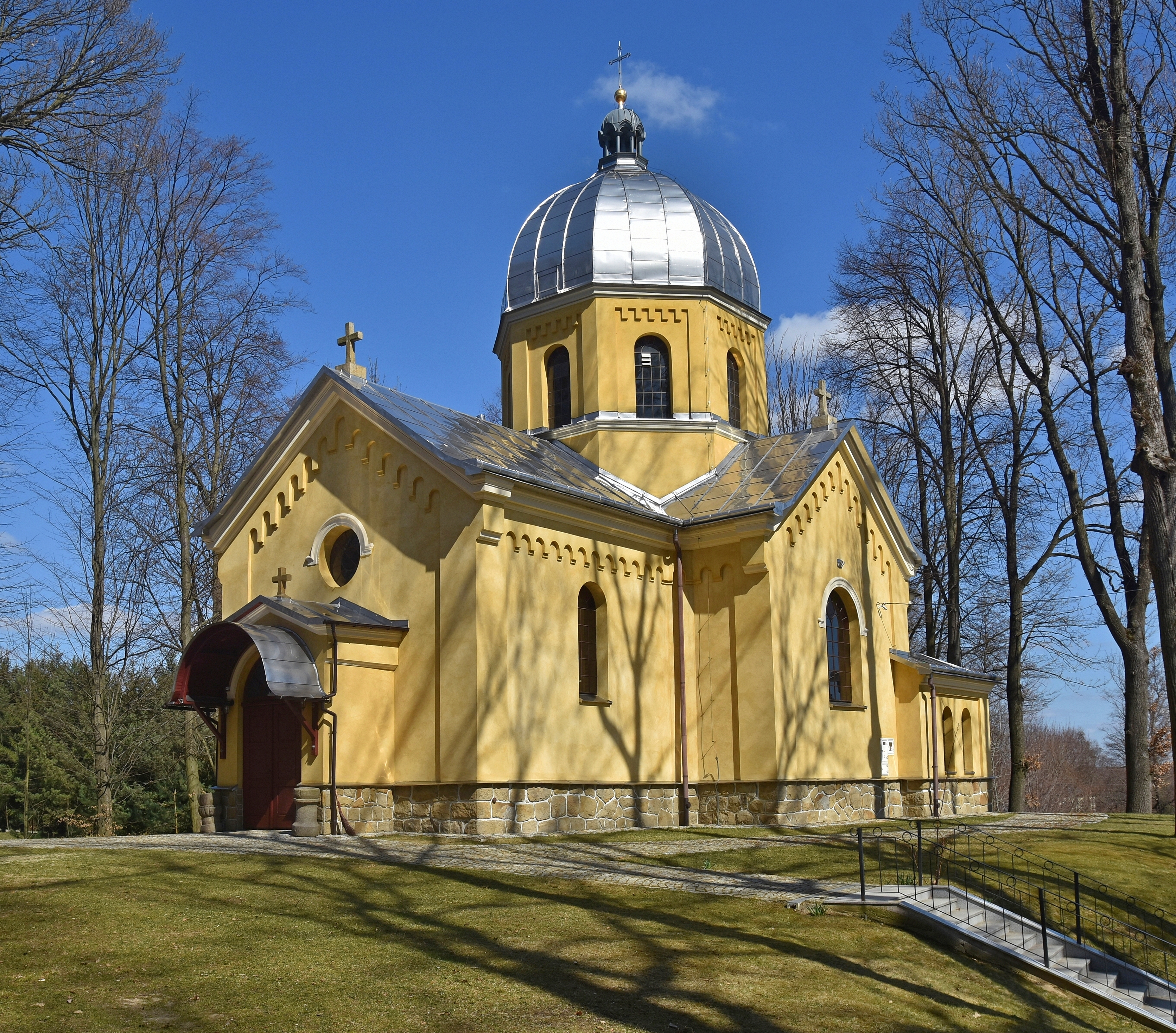 Oparówka, Cerkiew Narodzenia NMP w Oparówce